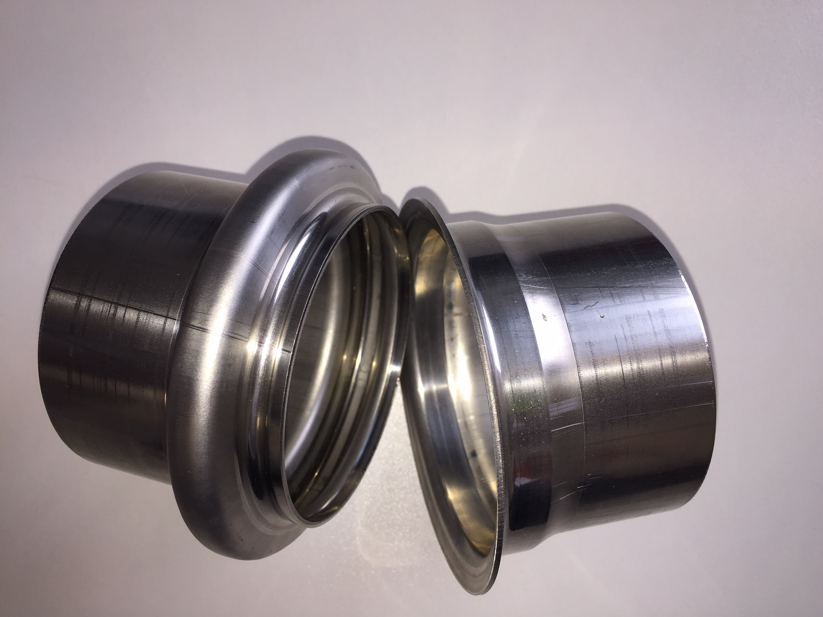 Gesteuerte schrittweise hergestellte Umformung an einem Abgasrohr.